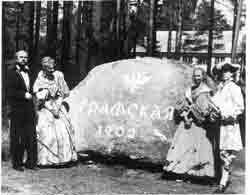 Основание поселков Графская колония и Дибуны